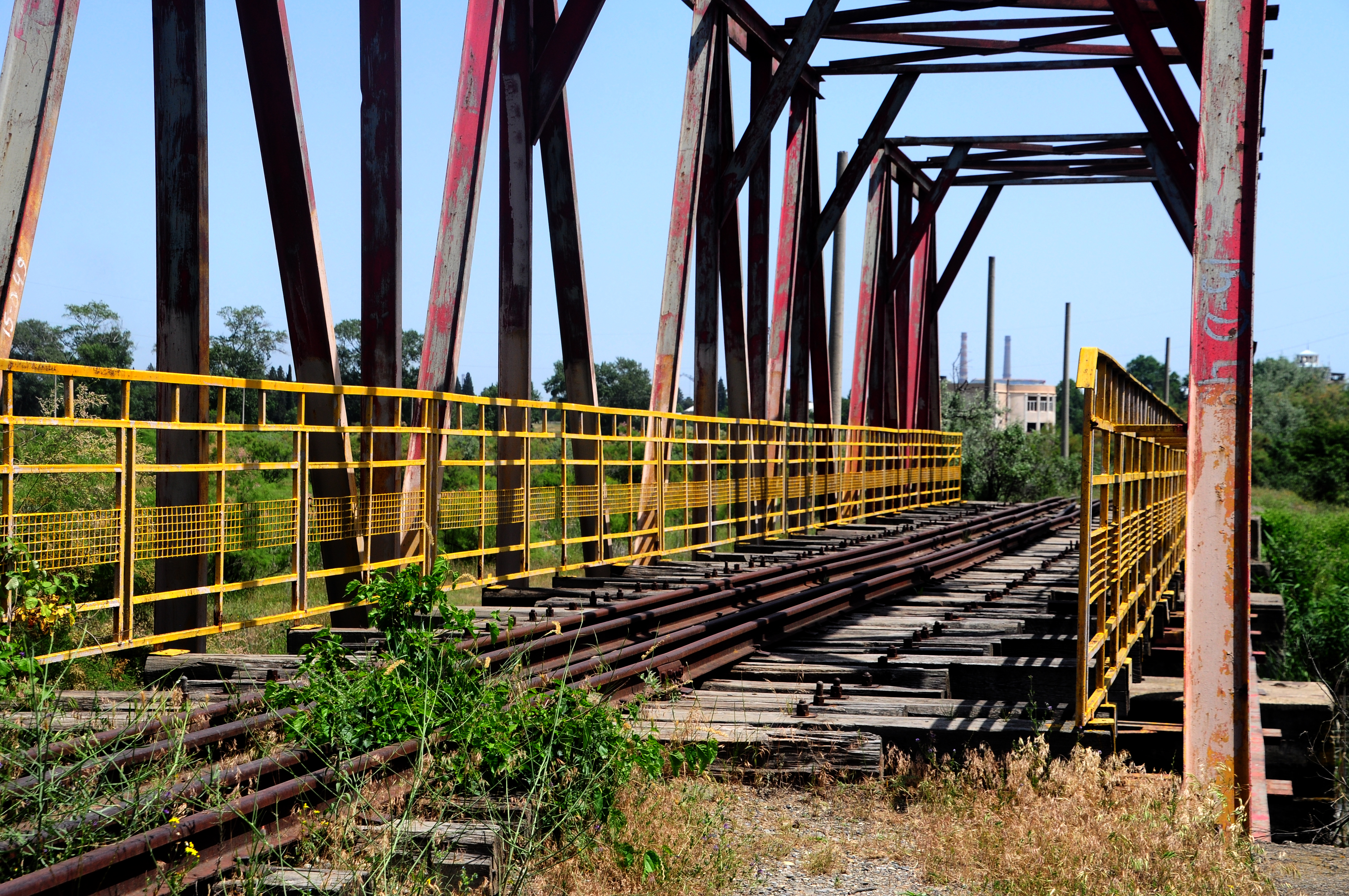 17611 Rustavi